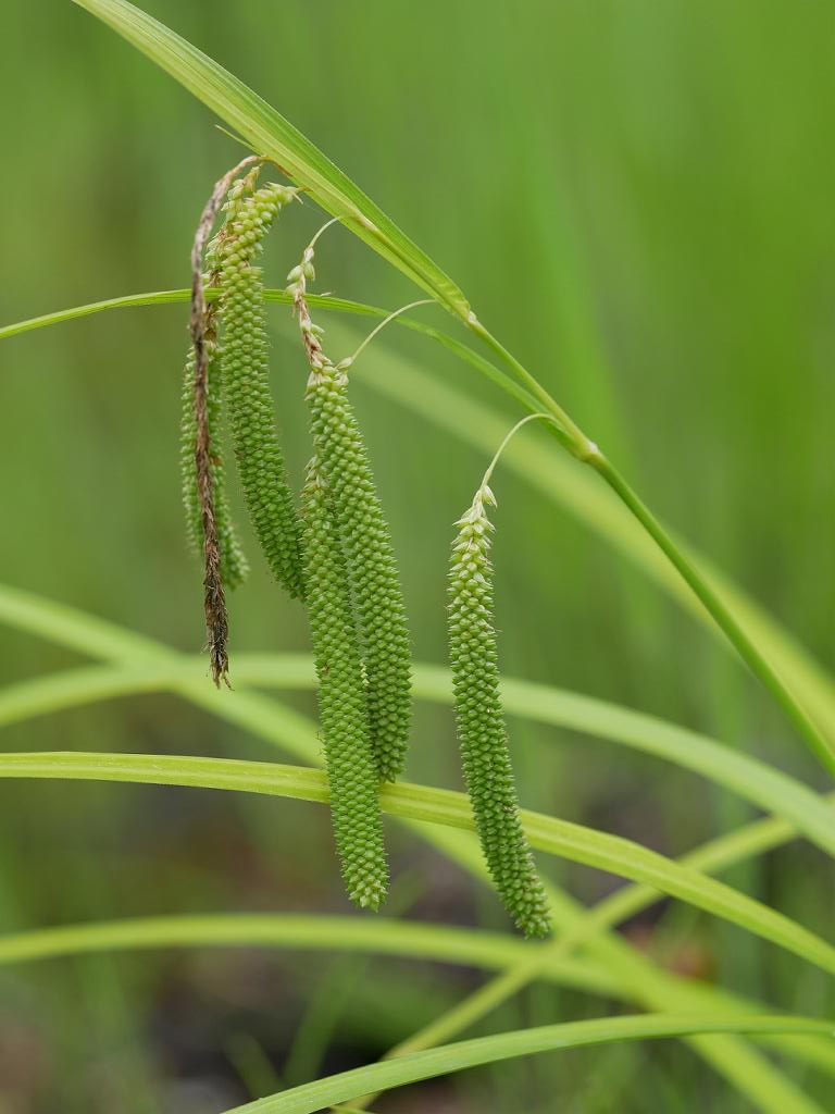 2019/06/19 群馬県：Gunma Pref., Japan